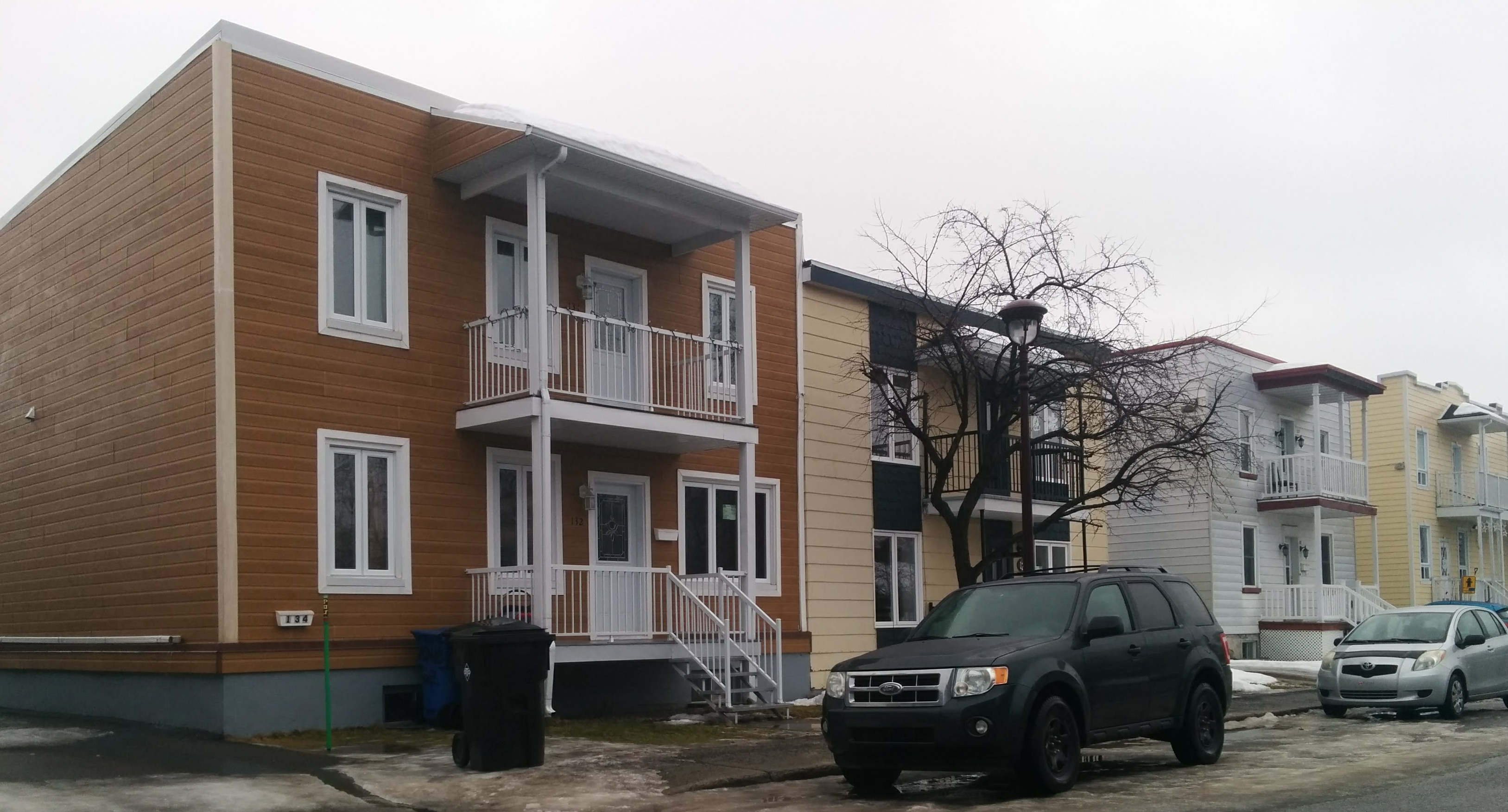 Une rue de l'ancienne ville de Vanier, maintenant un quartier de l'arrondissement Les Rivières, Ville de Québec.